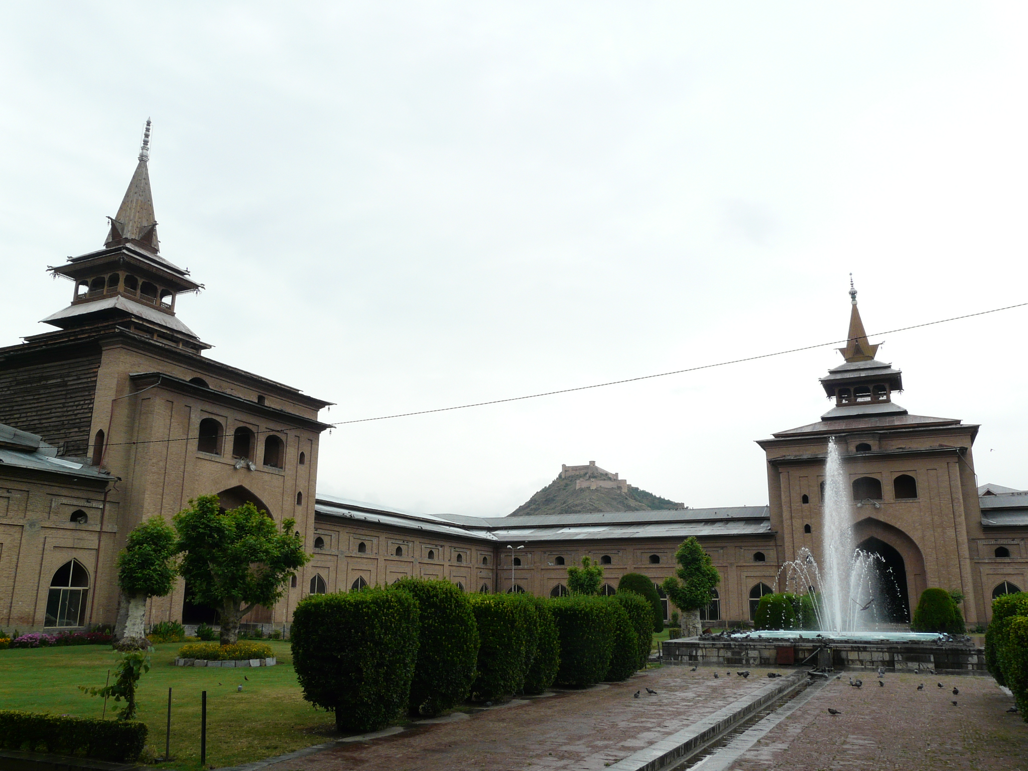 Jami Masjid courtyard Jamia Masjid, Srinagar, Jammu and Kashmir, India